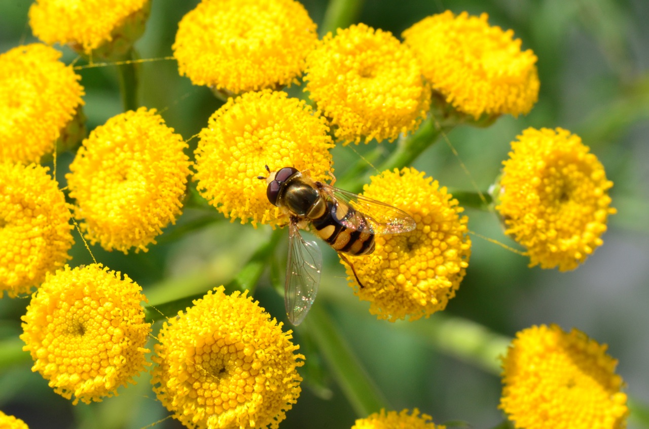 Tanacetum vulgare